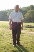 prof. dr hab. inż. Andrzej Reinhard